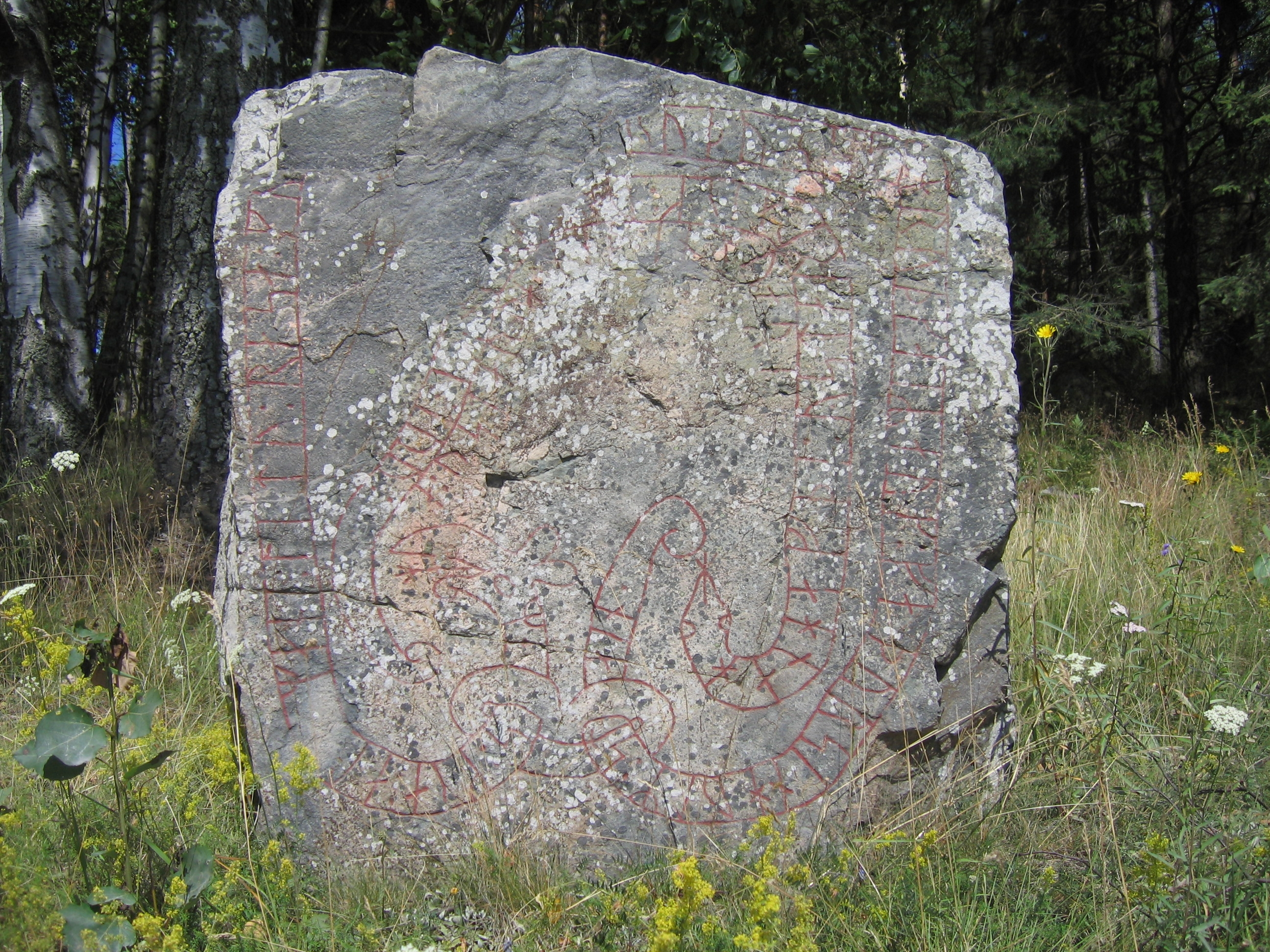 Runestone Sö 173